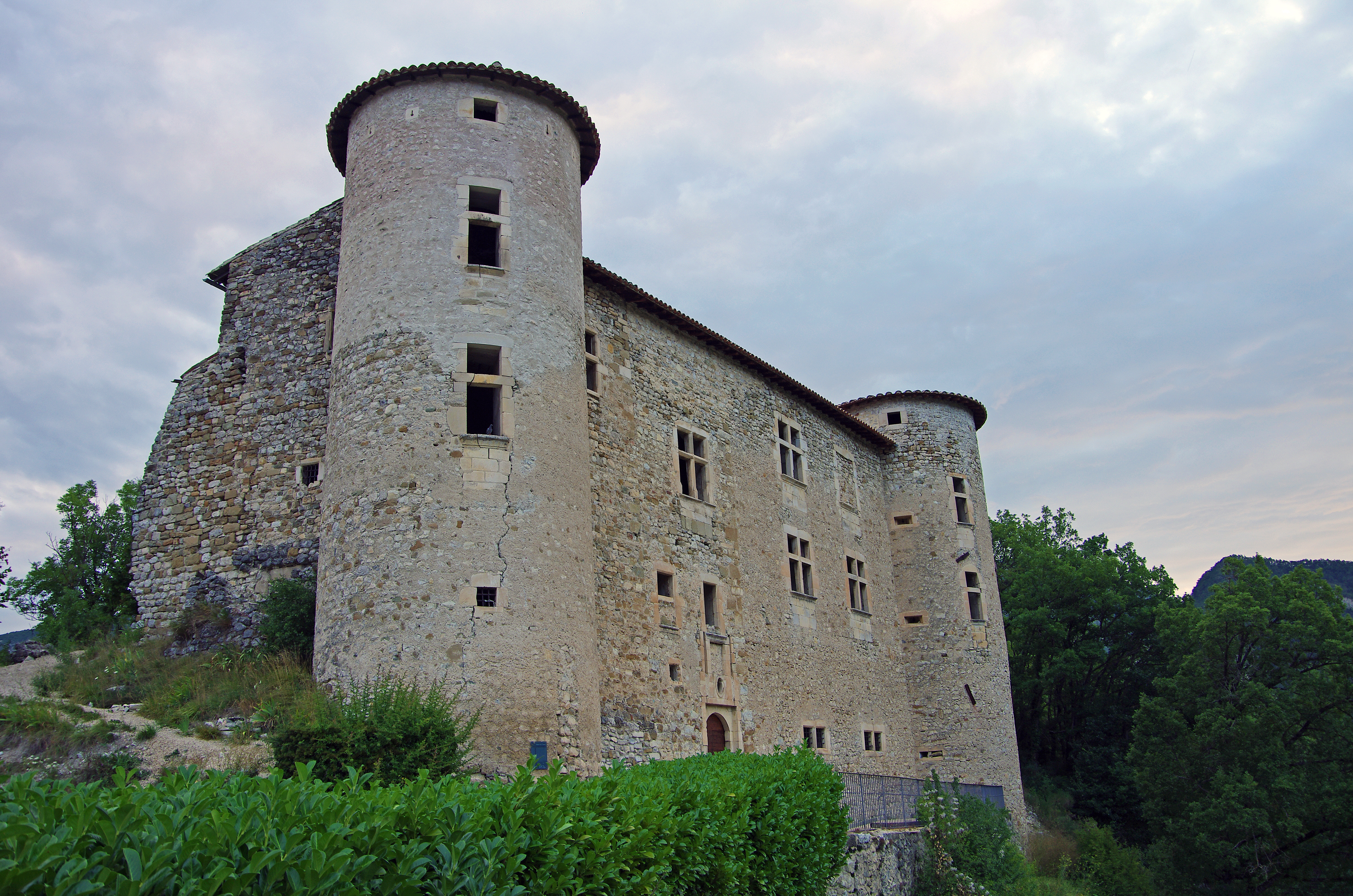 Château du XVIe siècle situé à La Charce (Drôme)